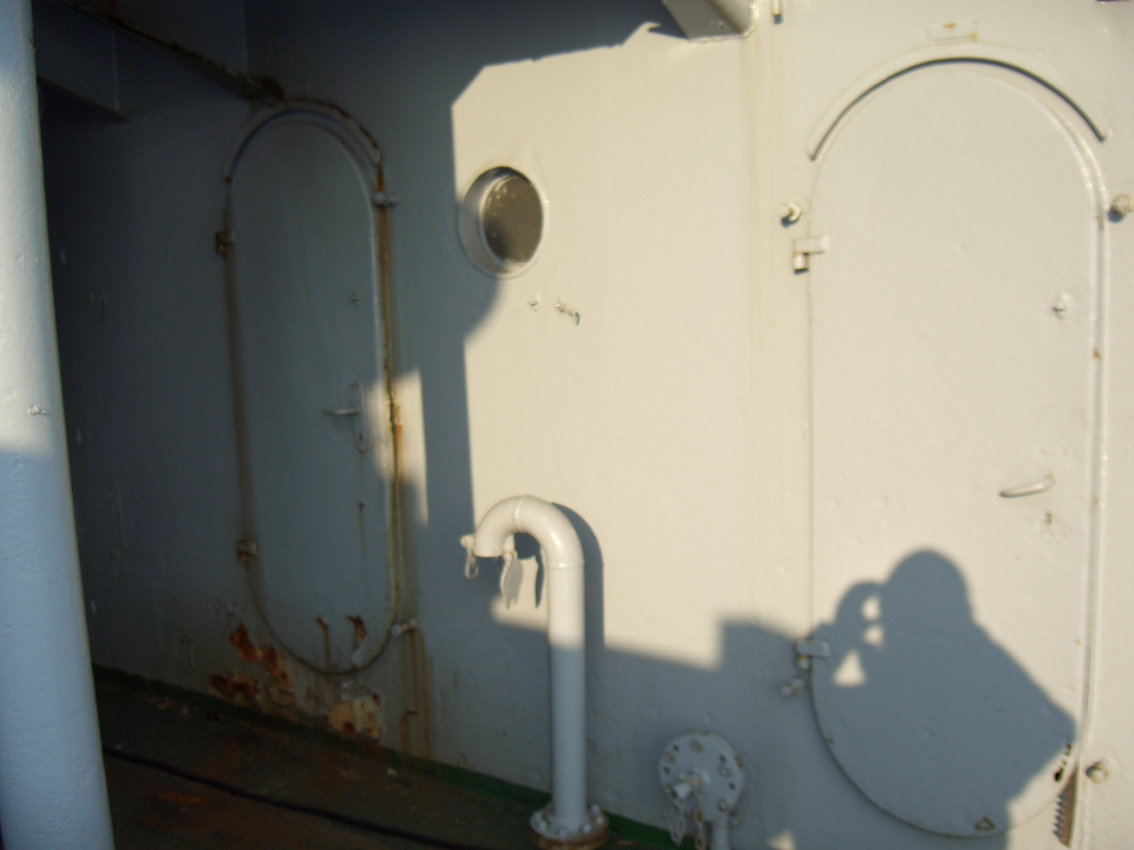 Bullauge